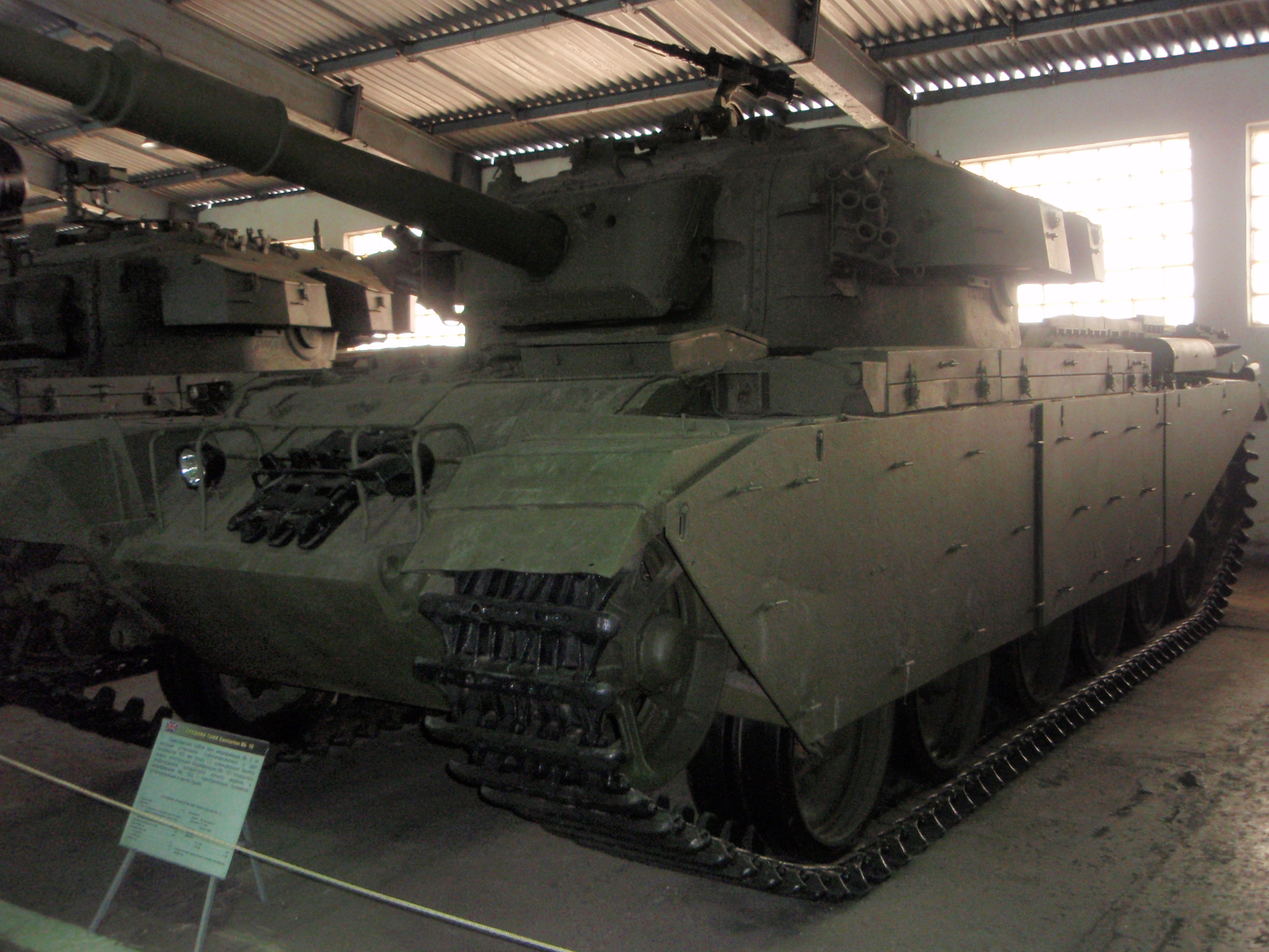 Британский средний танк Mk.X (Centurion) в Кубинке